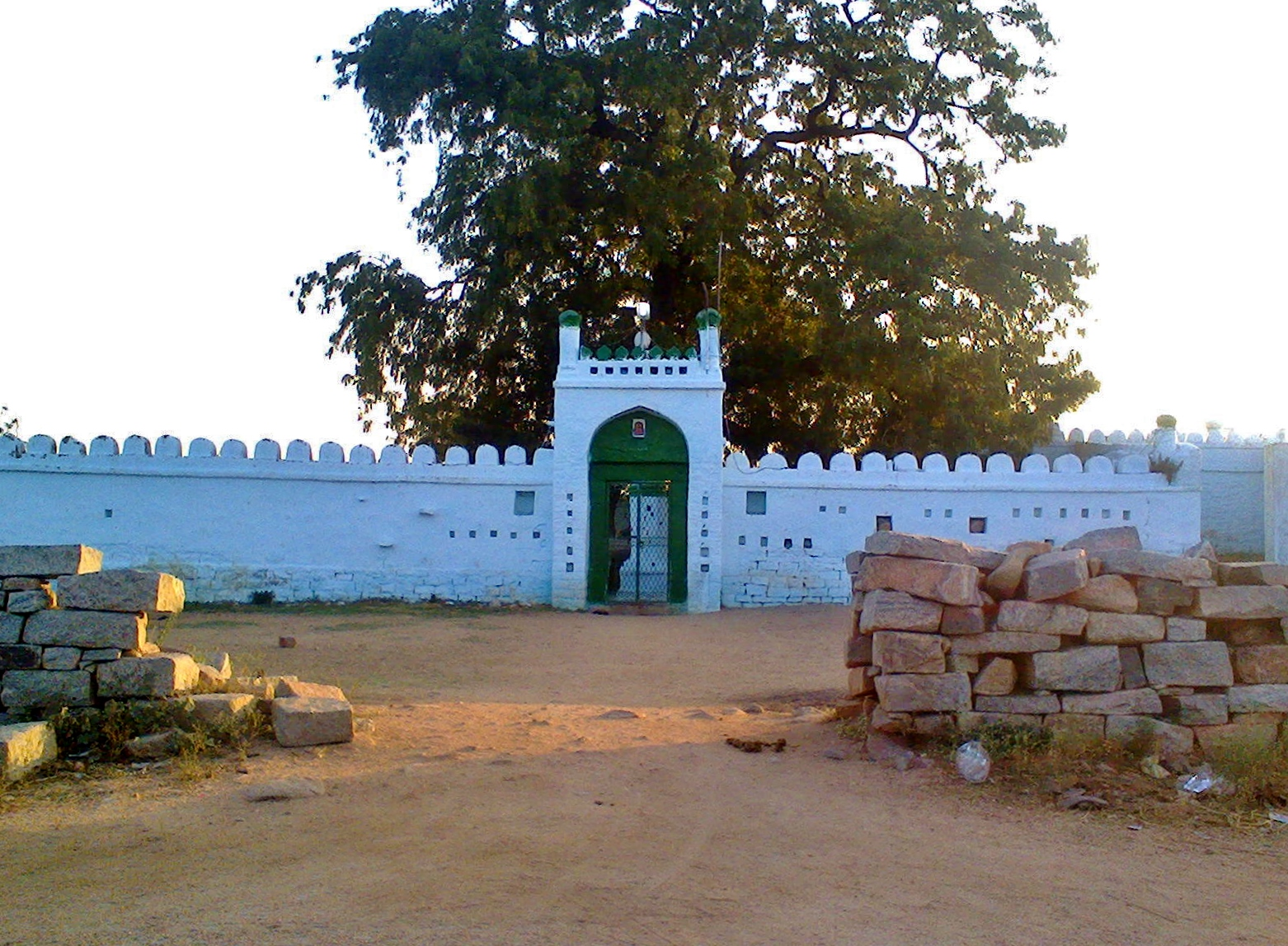 Dharvesh Ali Saheb Darga